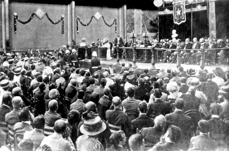 5. Esperanto-Weltkongress, Barcelona 1909. Feierliche Eröffnung des "5a Universala Kongreso de Esperanto". Blick über das Auditorium.